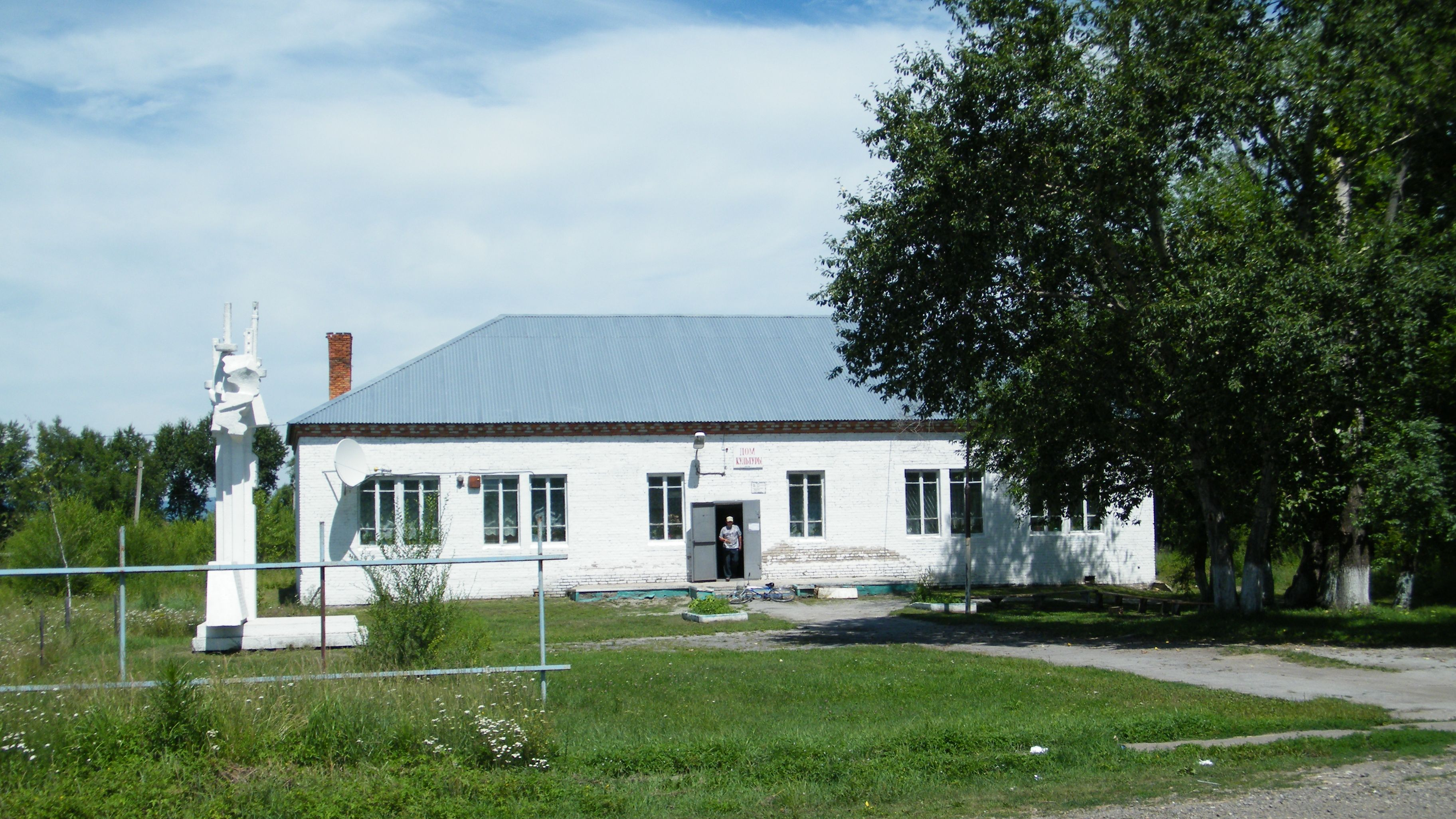 Улица села Гродеково район им Лазо Хабаровский край